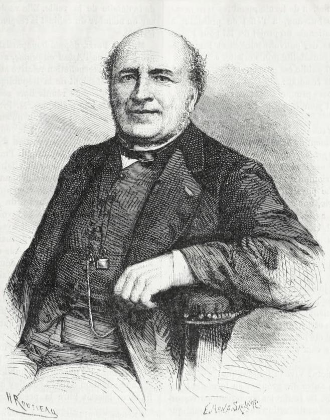 "M. Calmon, préfet de la Seine en 1872-73."